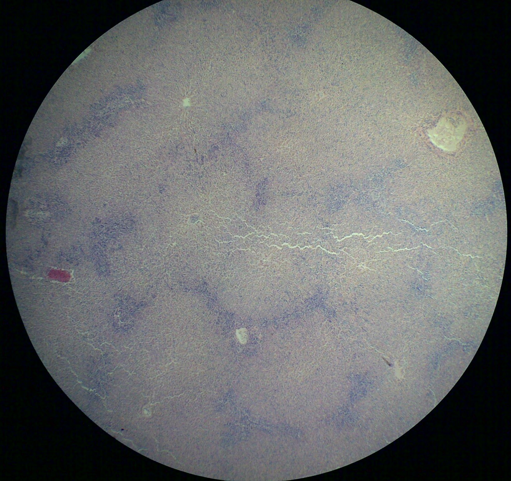 Печень при миелоидном лейкозе (лейкемия).